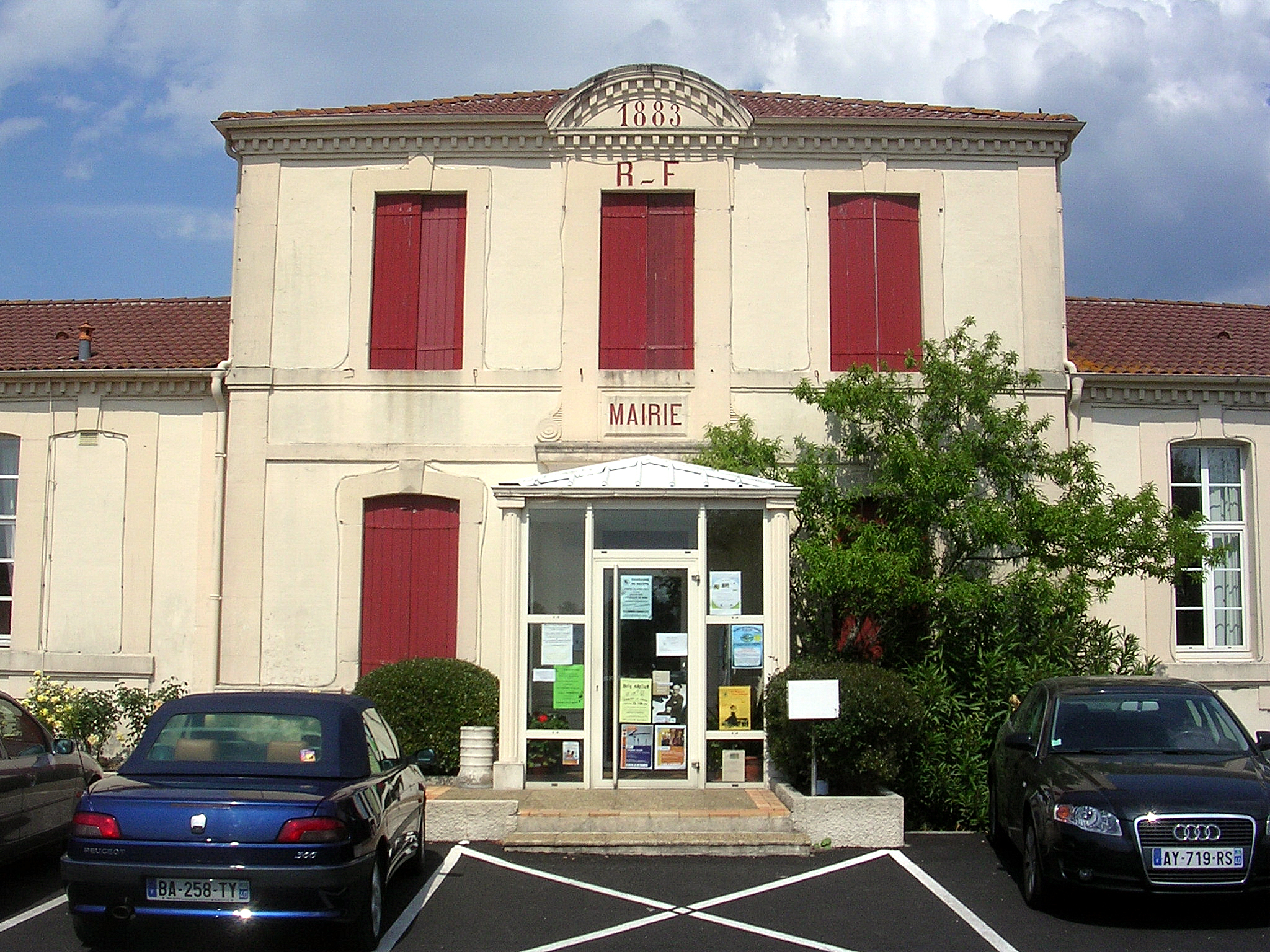 Mairie de Sainte-Eulalie-en-Born, dans le département français des Landes